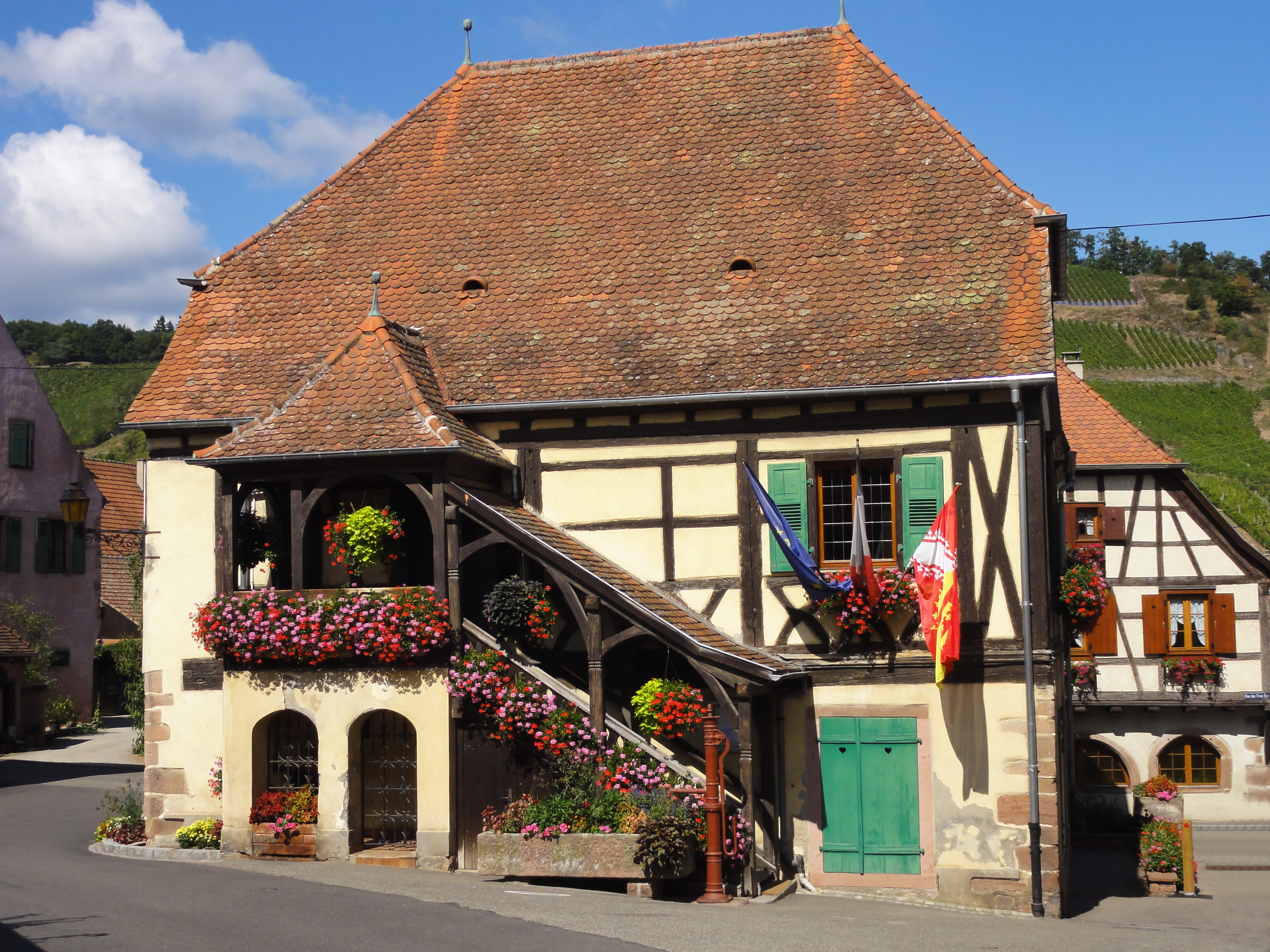 Alsace, Haut-Rhin, Niedermorschwihr, Hôtel de Ville (1908), place de l'église. .